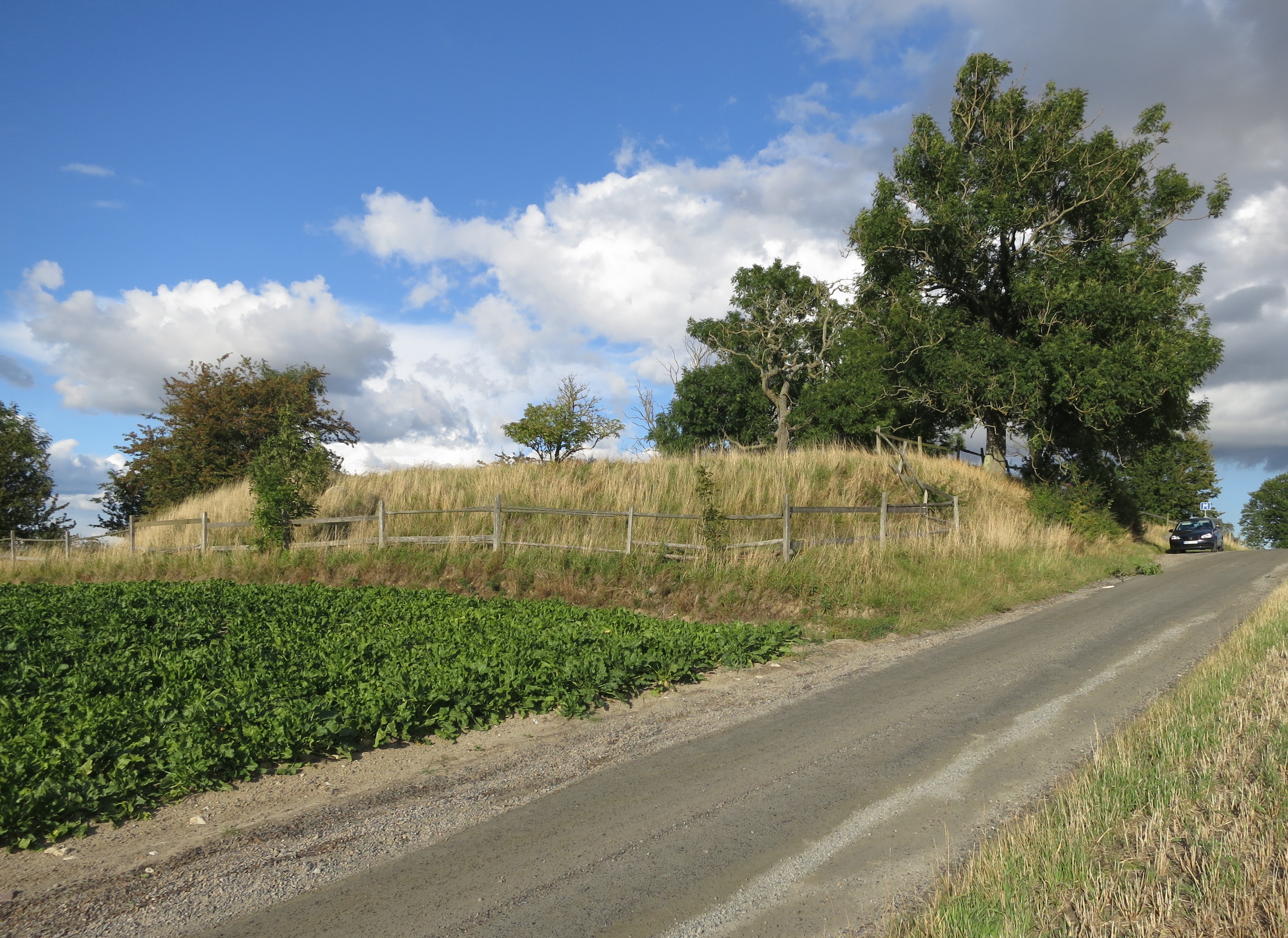 Saritslövs kyrkoruin